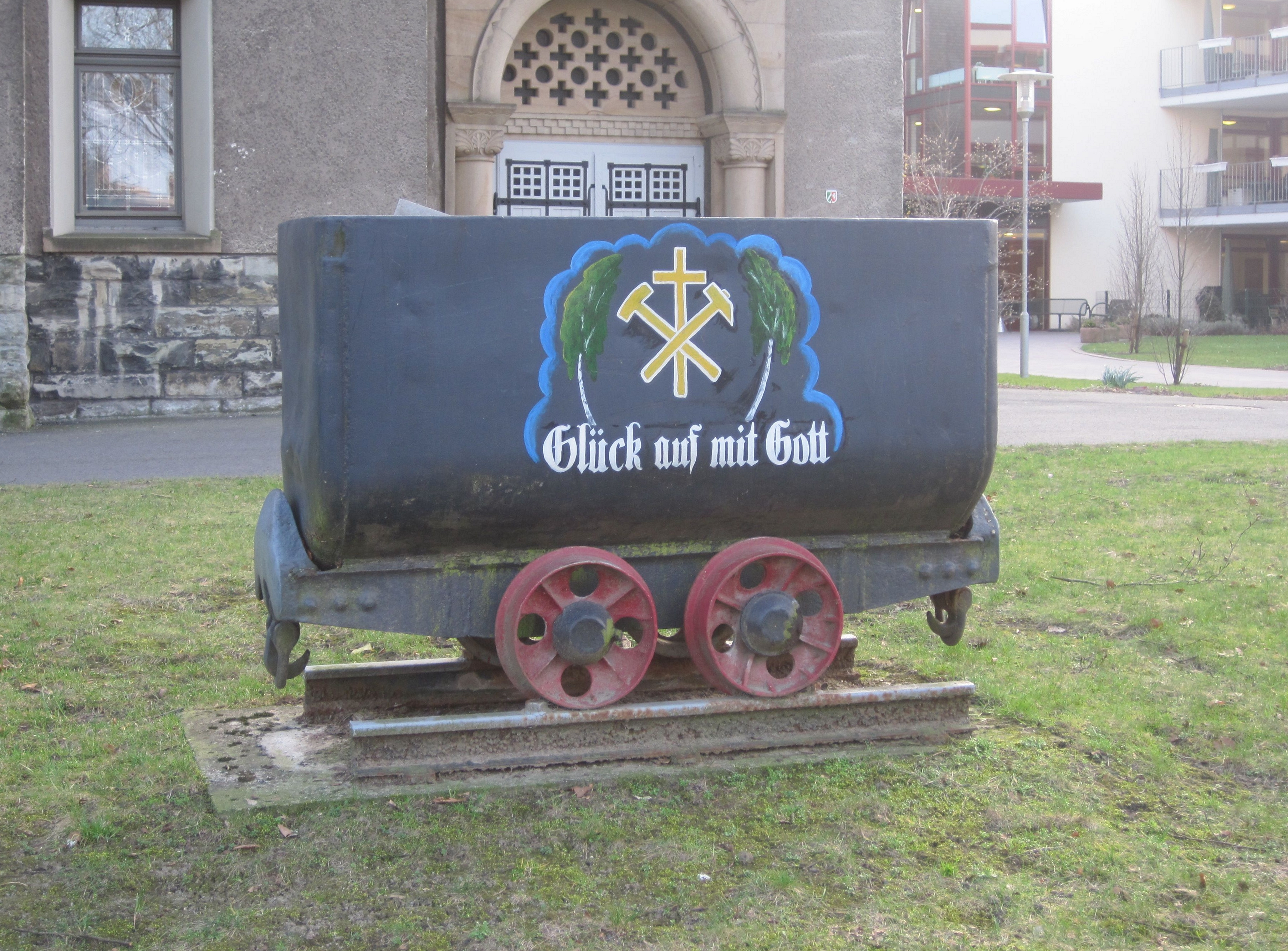 Das Foto zeigt ein Bergmannsdenkmal vor der Kreuzkirche in Hamm-Bockum-Hövel.